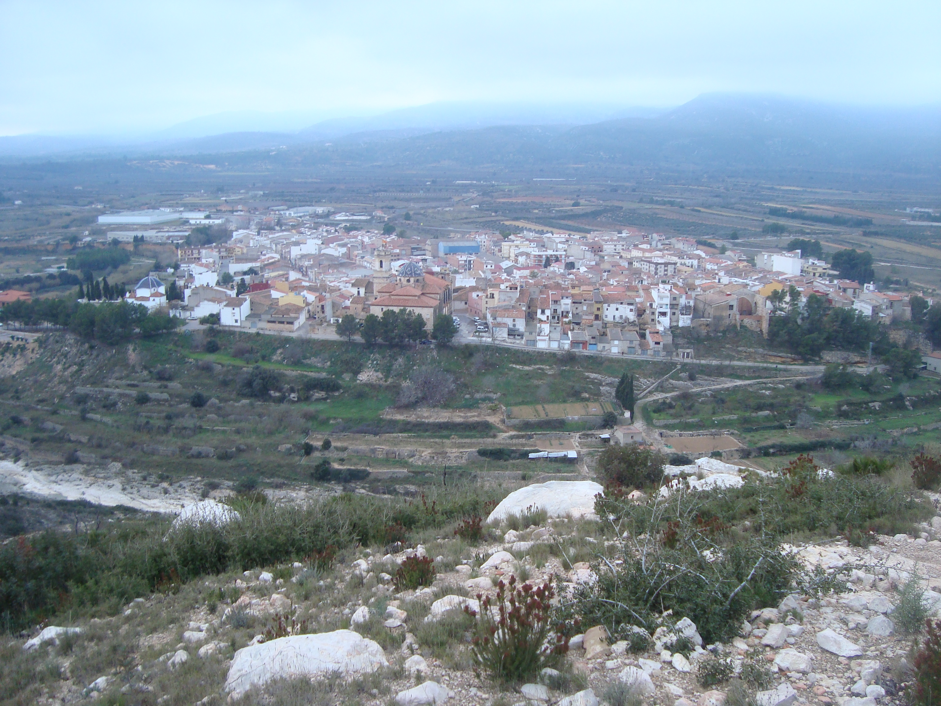 Panorámica de les Coves de Vinromà